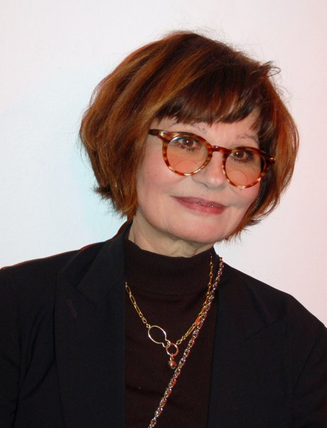 Guesch Patti aux étoiles d'or du cinéma français.